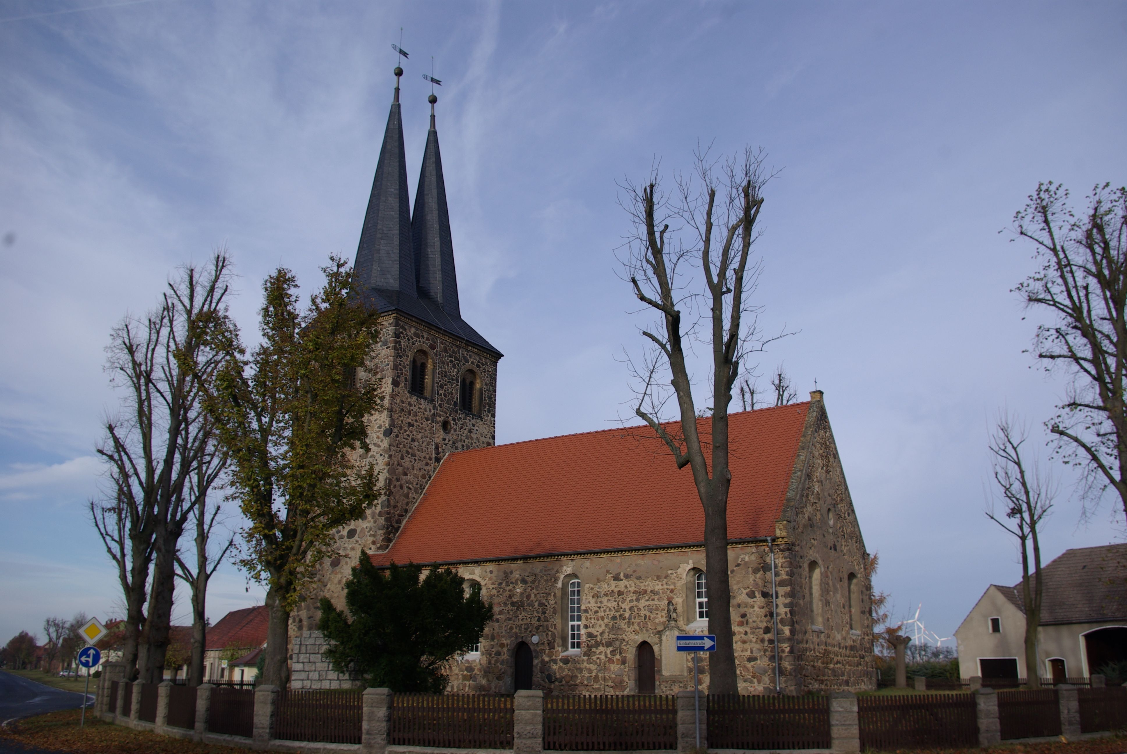 Ihlow in Brandenburg. Die Dorfkirche mit den zwei Türmen steht unter Denkmalschutz.